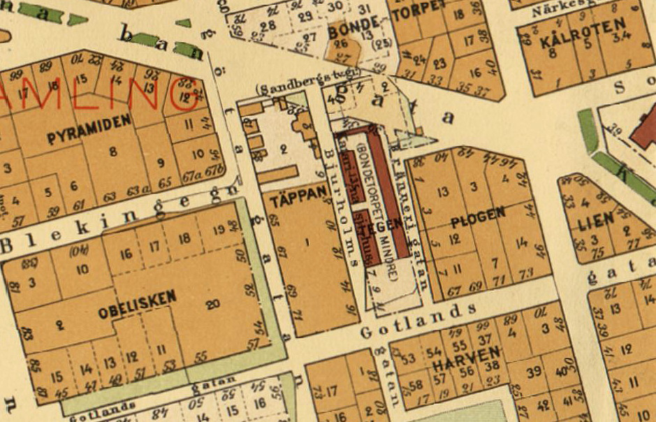 Kvarteren Tegen, Täppan, Plogen med omgivning